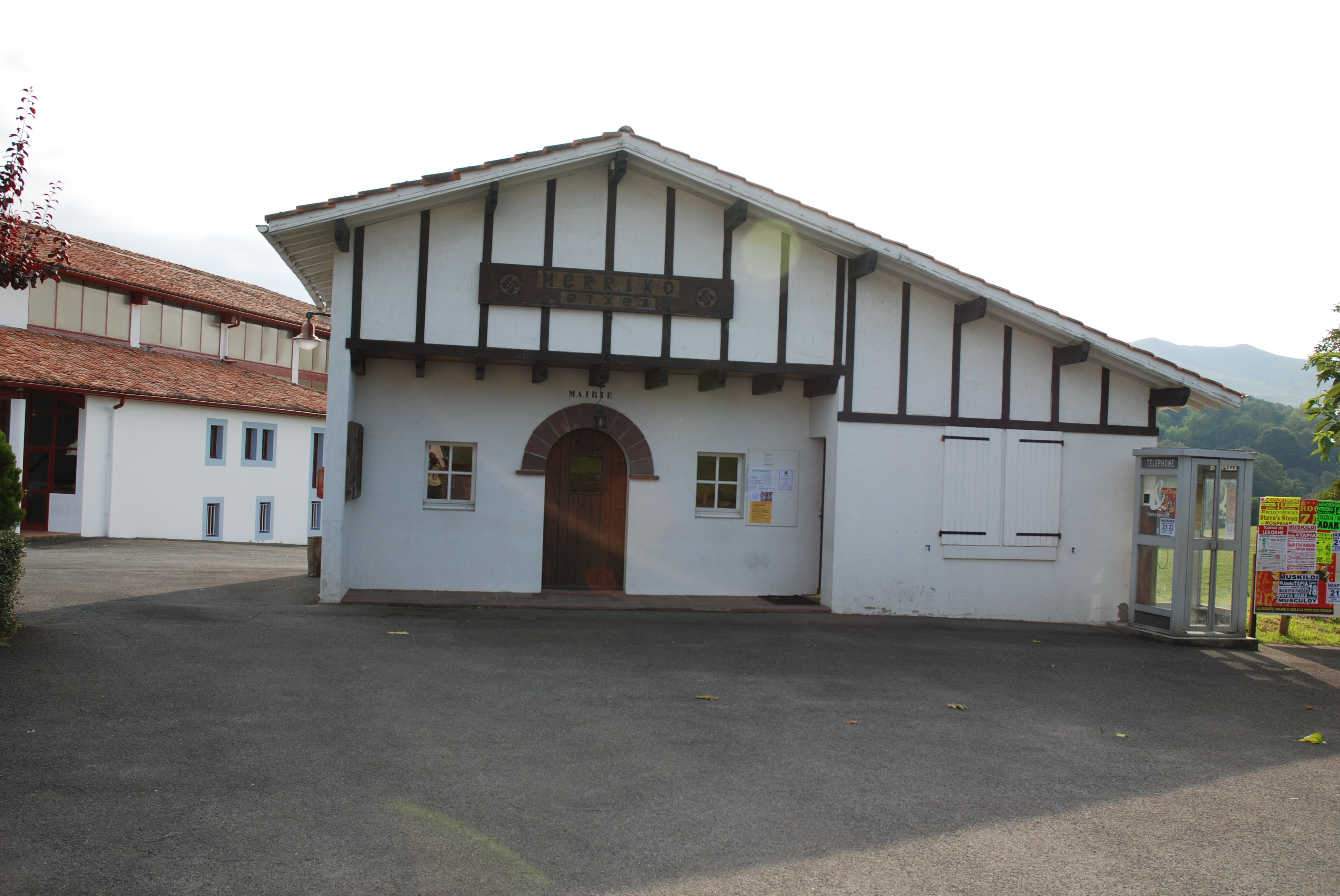 Saint-Esteben, la mairie